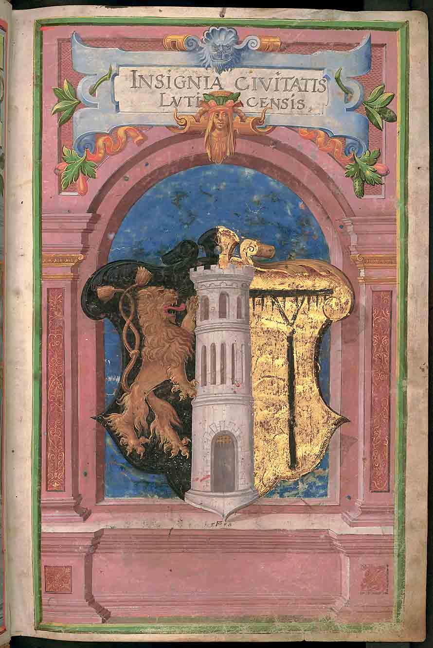 Erb z knacionálu